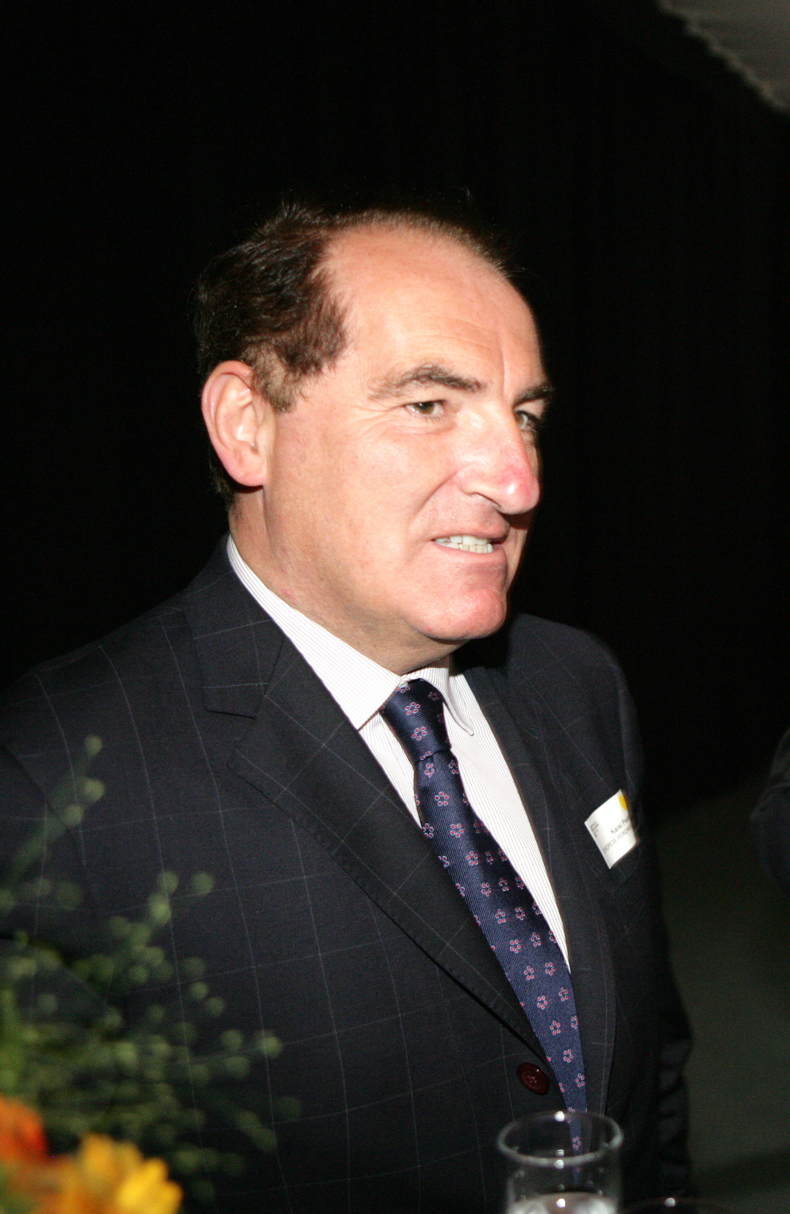 Karel Pinxten (Europese Rekenkamer)